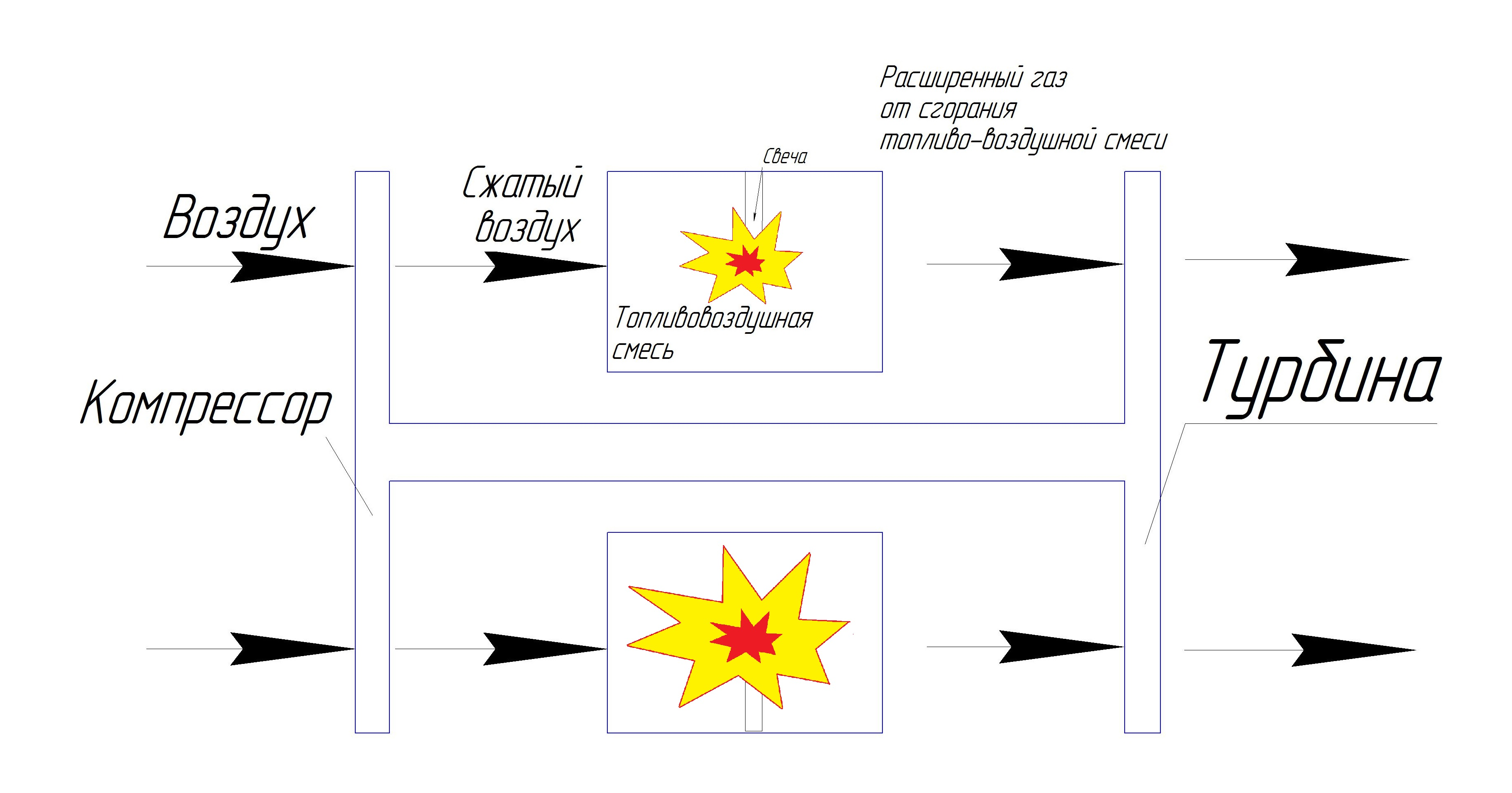 Простейшая схема ГТД